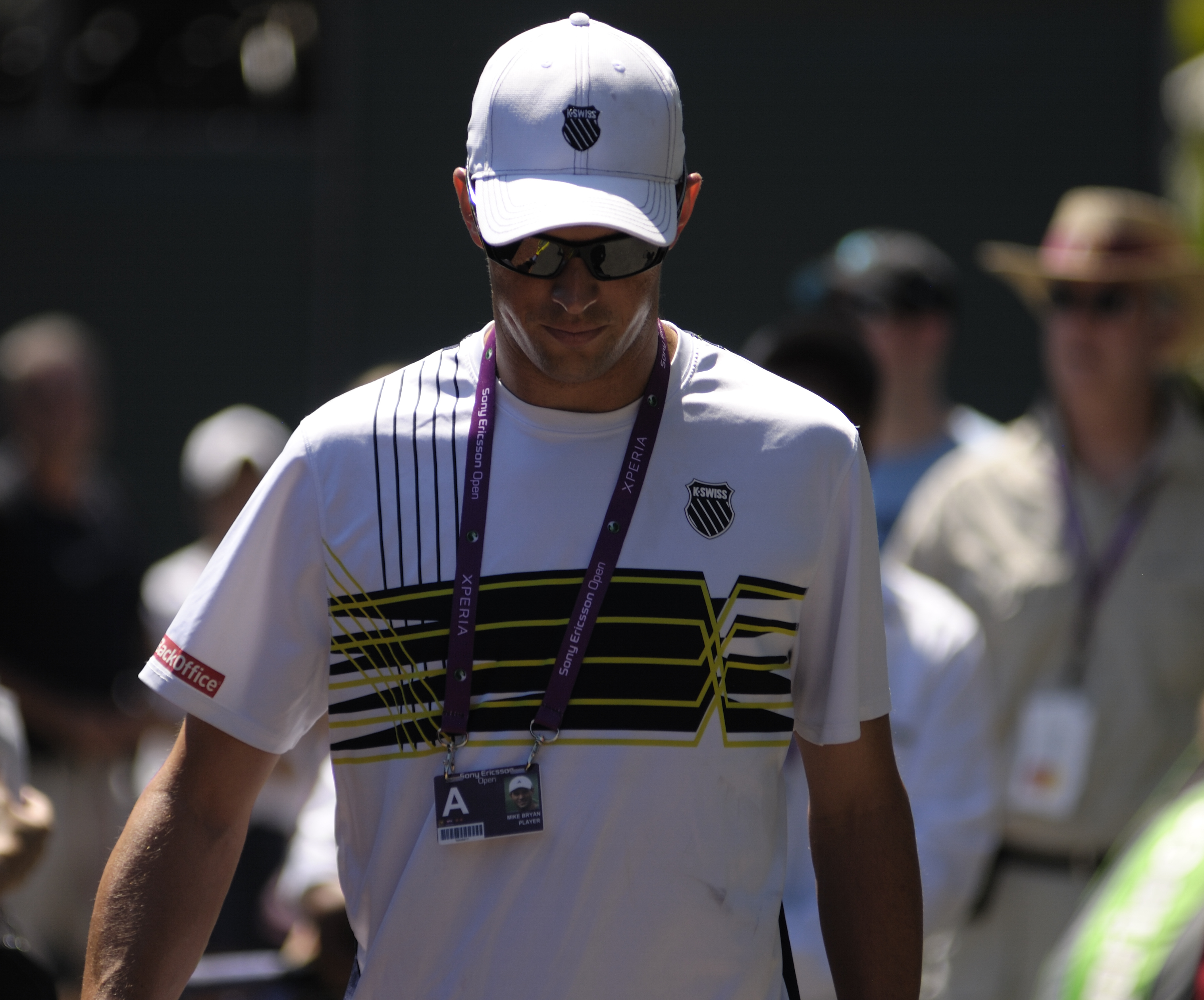 Mike Bryan in Miami